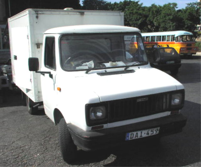 Freight Rover 250 D